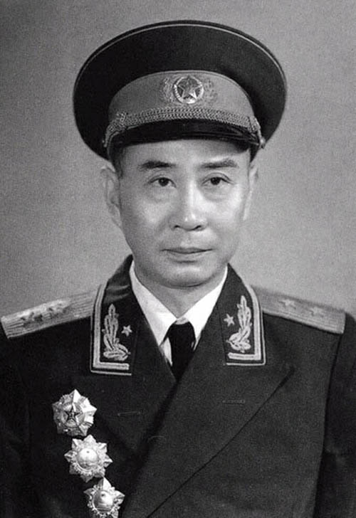 张经武